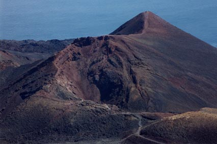 Fotografía realizada por Wesisnay